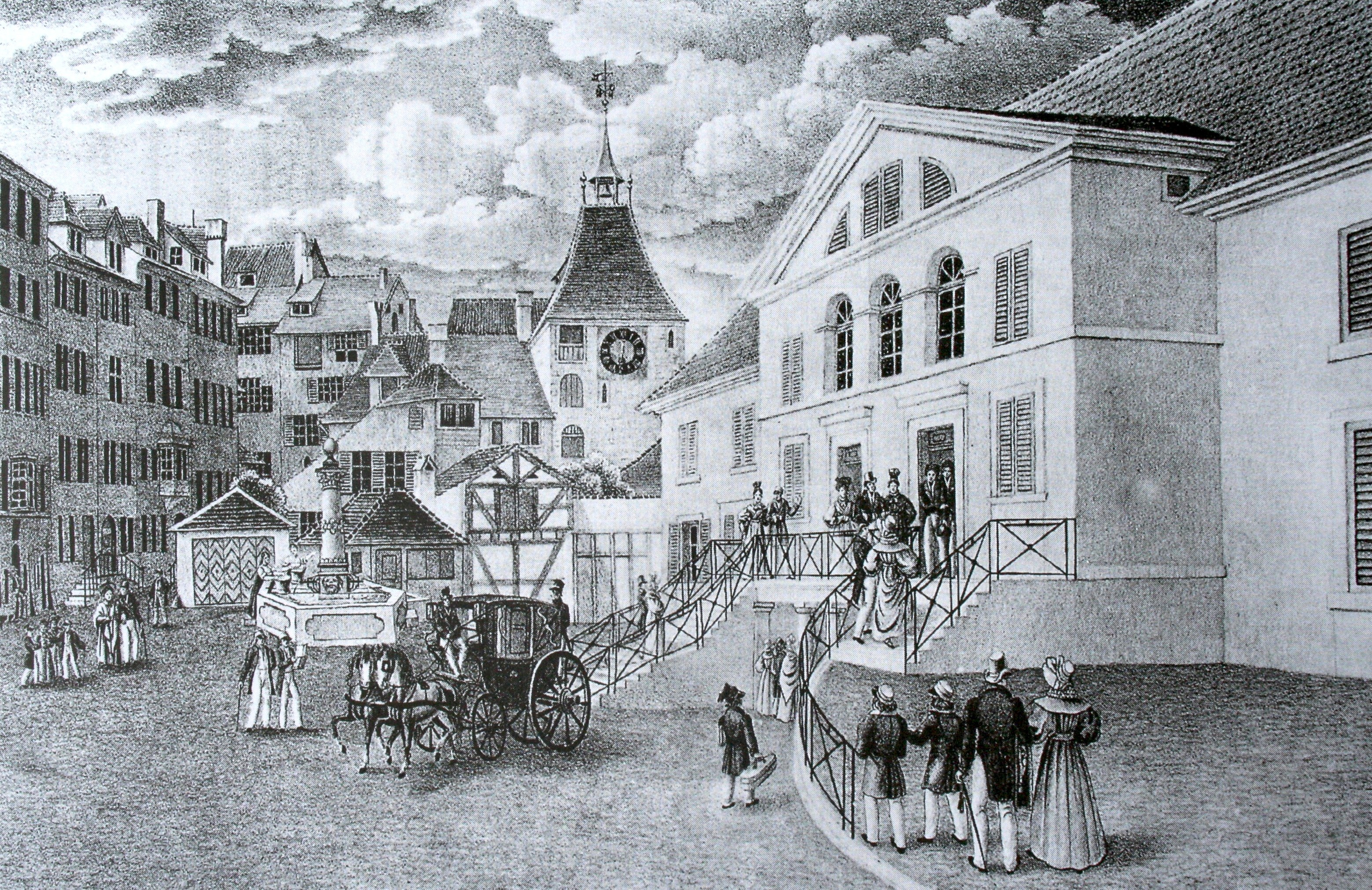 Barfüsserkloster: Die ehemalige Kirche als Theater an der unteren Zäune. Farblitho von Kaspar Studer in 'Souvenirs de Zurich', um 1836